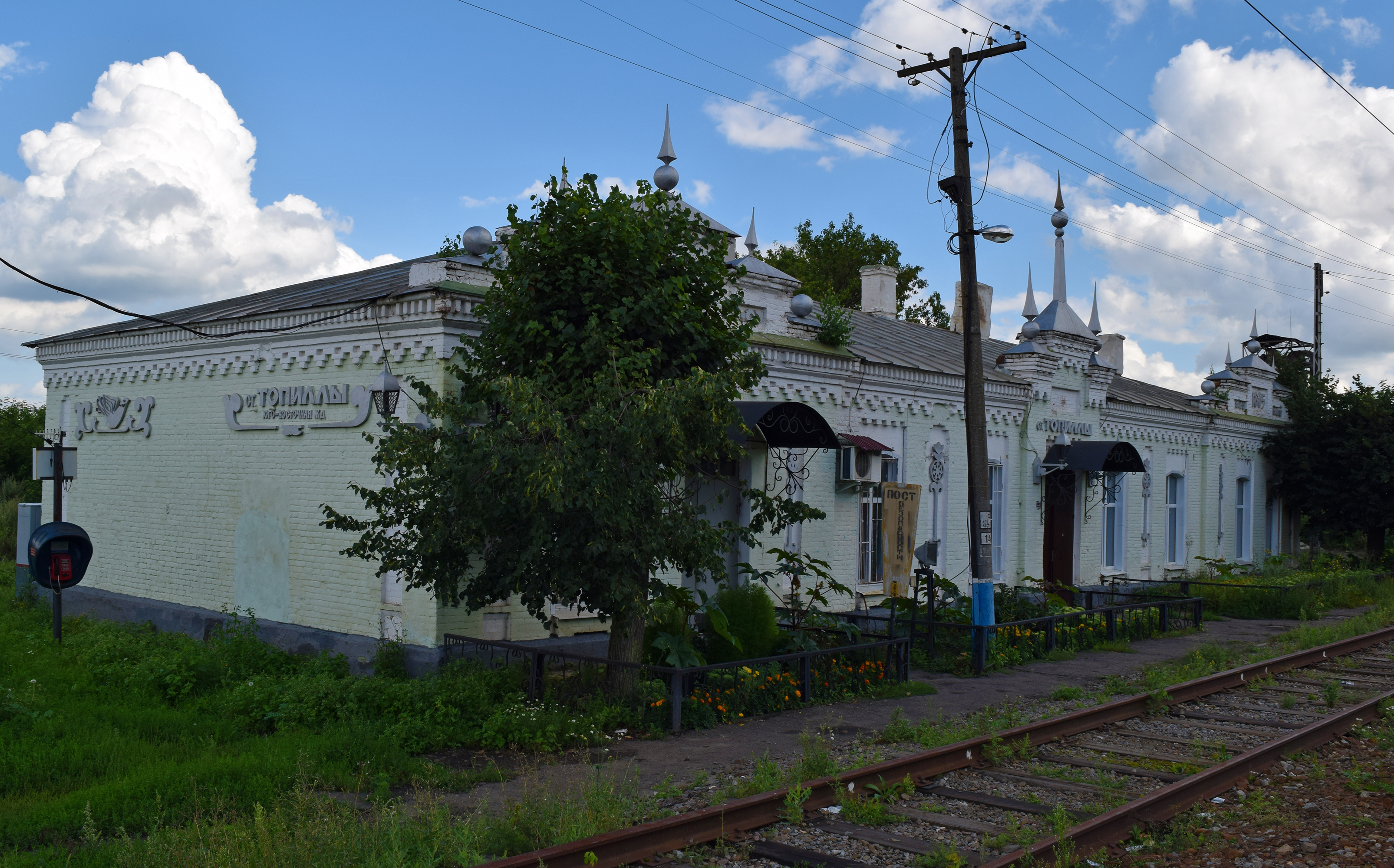 Здание вокзала железнодорожной станции Топиллы 1865 года постройки. Милославский район, Рязанская область